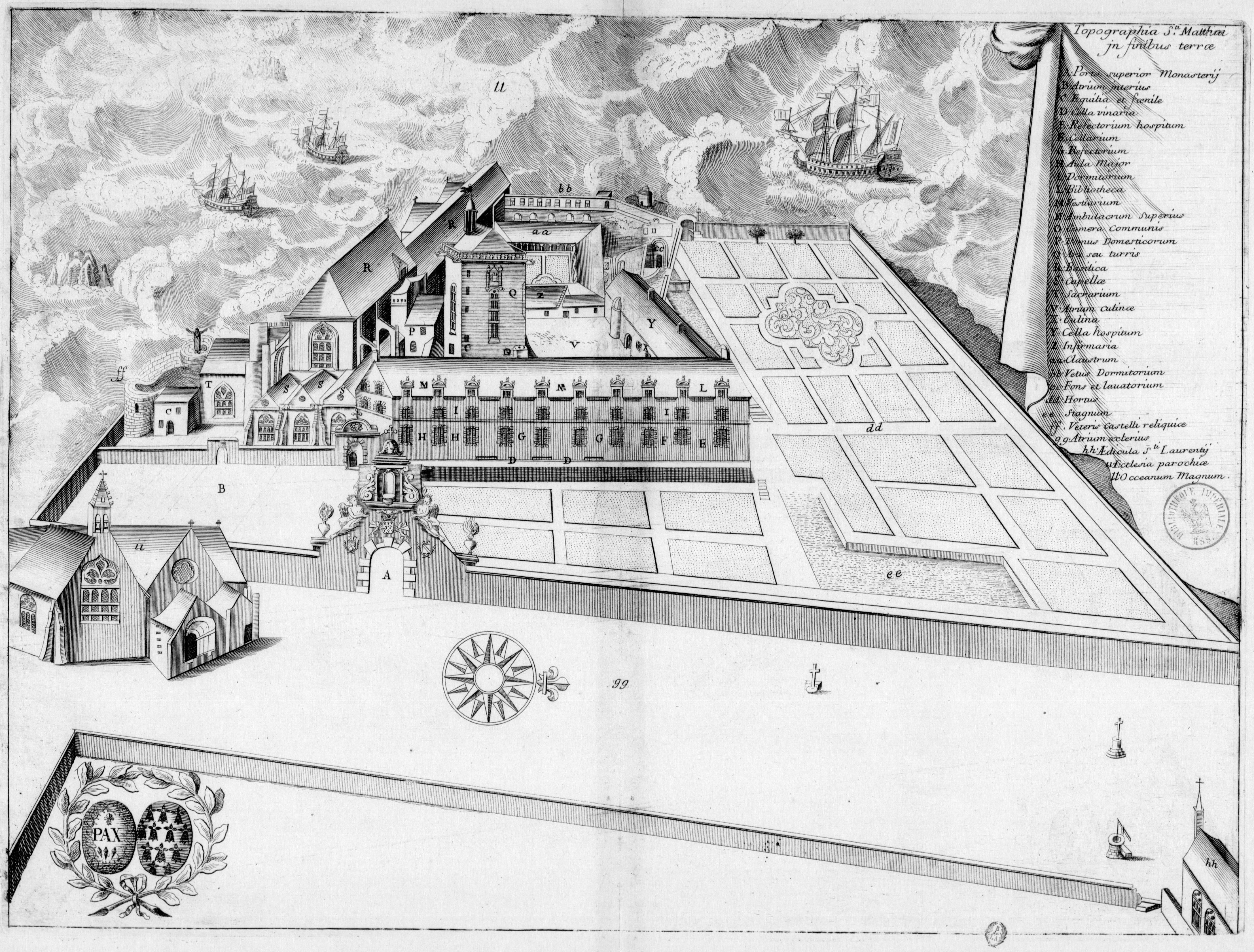 Planche gravée du 17ème siècle représentant l'abbaye Saint-Mathieu de Fine-Terre, dans le livre Monasticon Gallicanum.